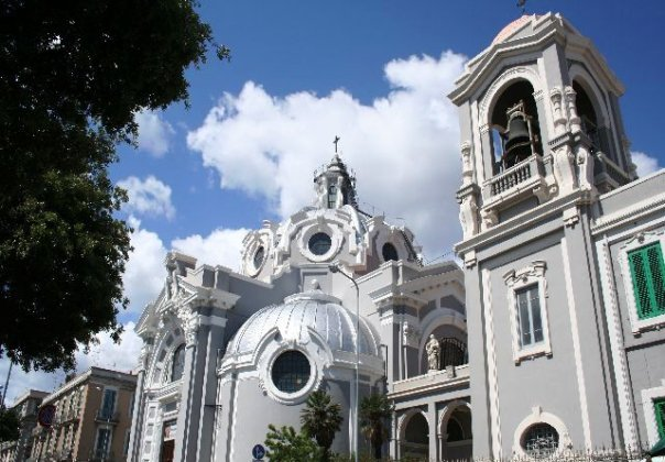 Chiesa del Carmine di Messina e annesso Convento dei Carmelitani